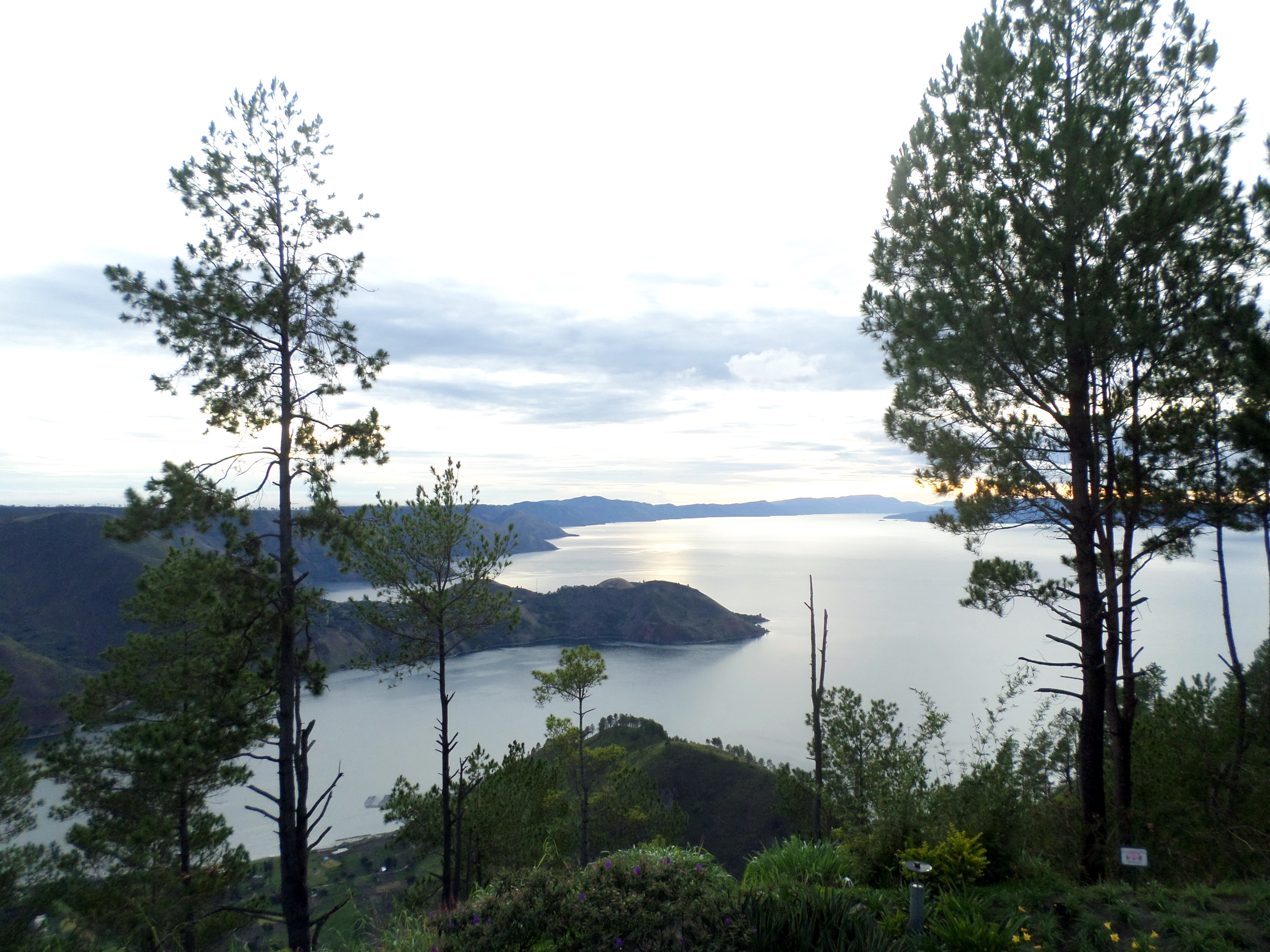 Pemandangan Danau Toba dari Simalem Resort, North Sumatra